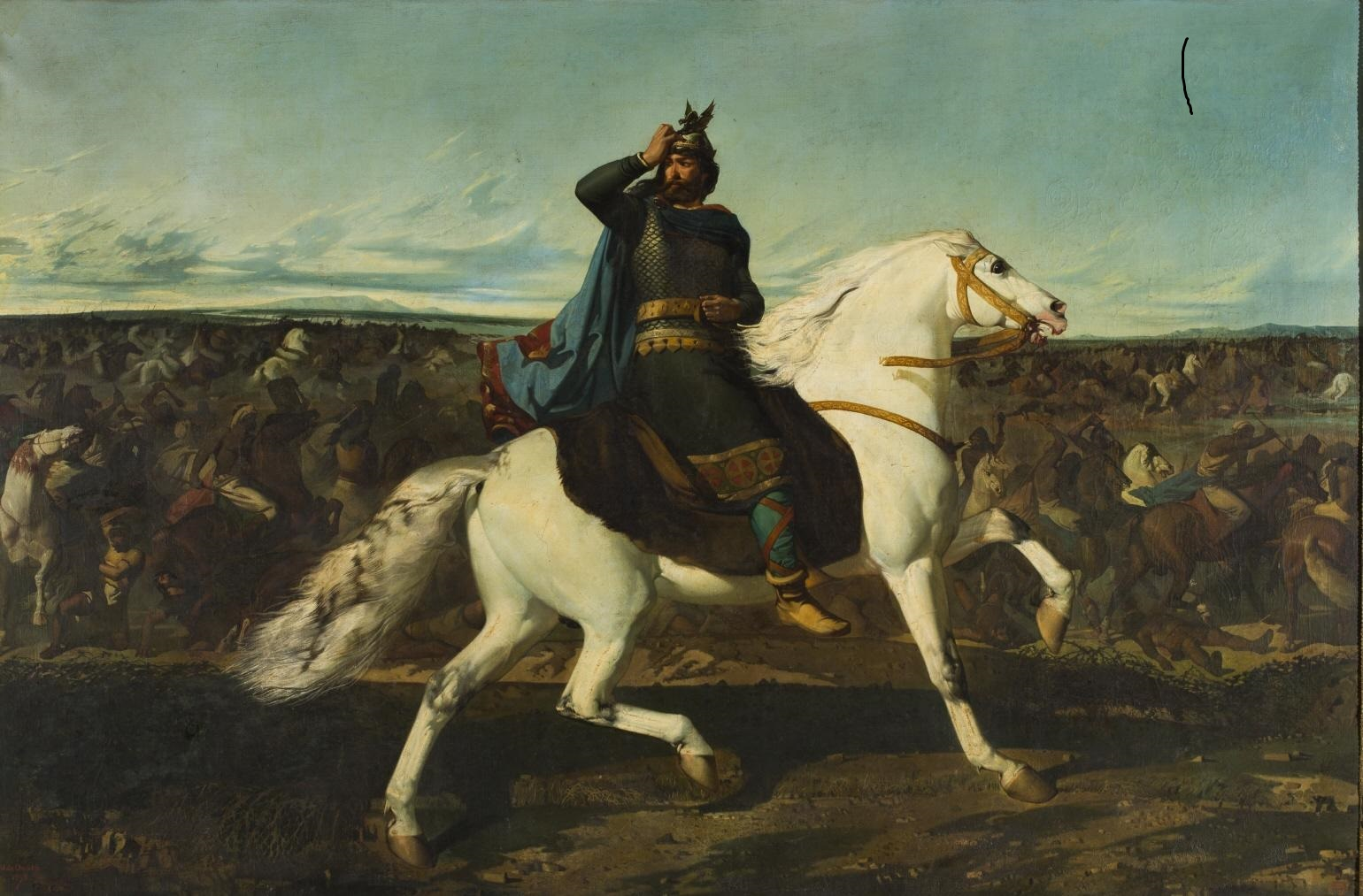 El lienzo muestra a Don Rodrigo († 711), el último rey de los Visigodos, en la batalla de Guadalete, que se libró en el año 711 en las inmediaciones del río Guadalete y donde moriría el propio monarca y el ejército visigodo sería aplastantemente derrotado por el ejército musulmán que había invadido España.